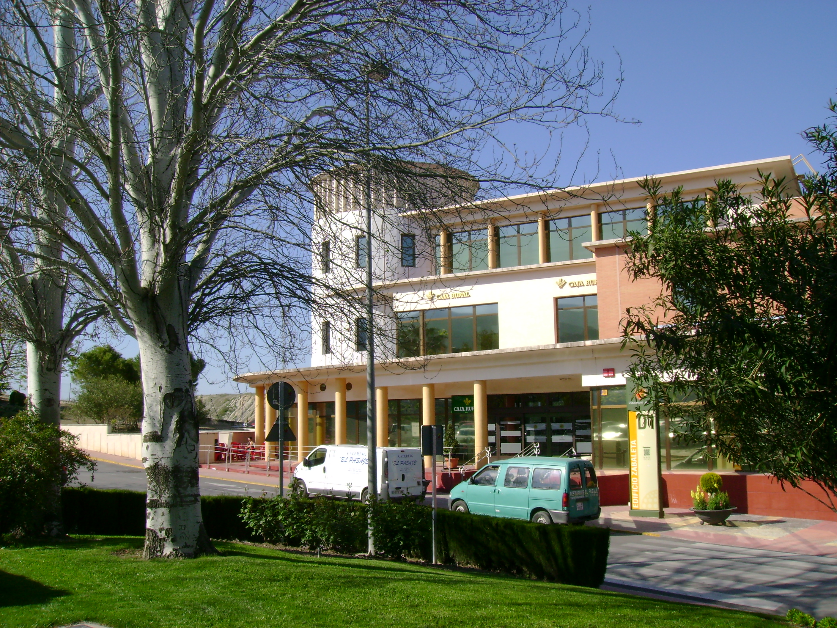 Edificio Zabaleta de la Universidad de Jaén.